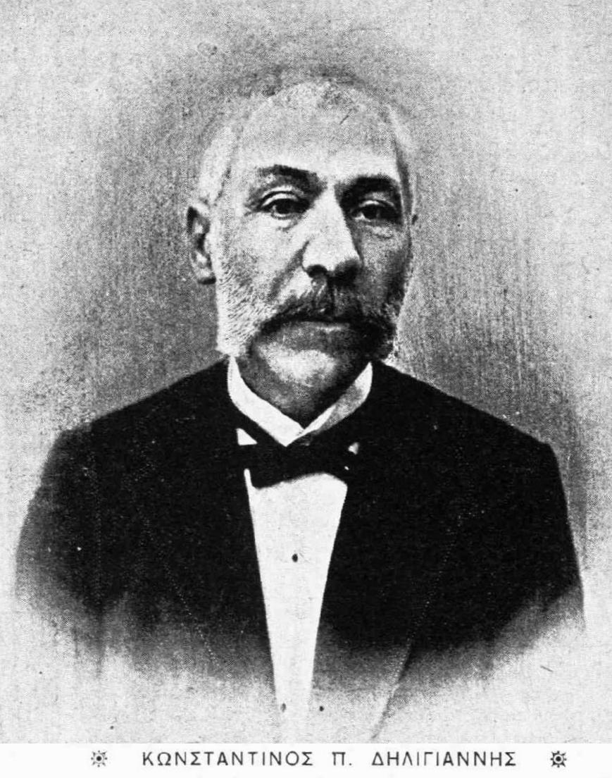 Griechischer Universitätsprofessor, 19. Jahrhundert